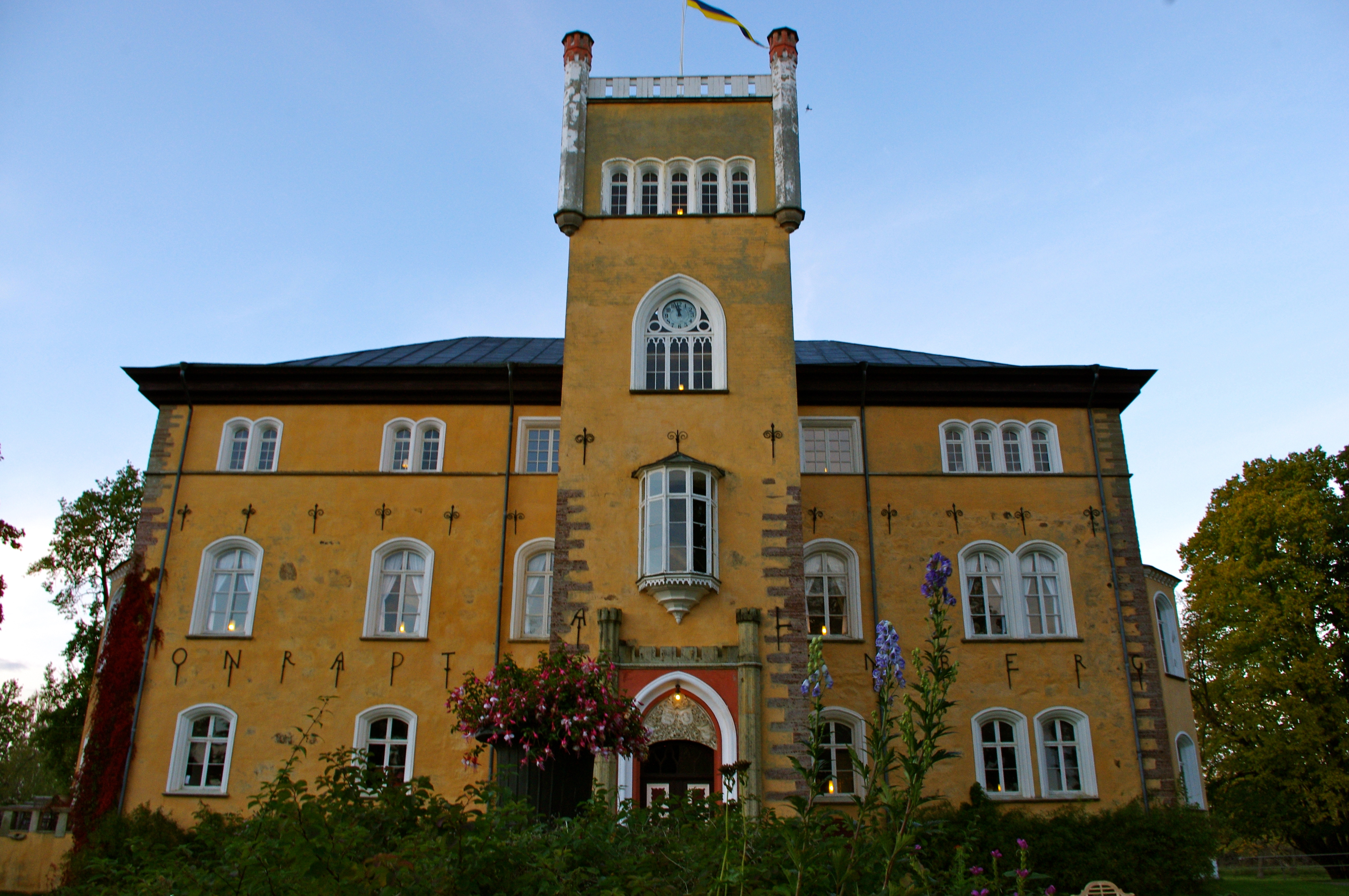 Börstorp Slott ligger i Mariestads kommun och byggdes under mitten av 1600 talet av Riksrådet Conradt Falkenberg